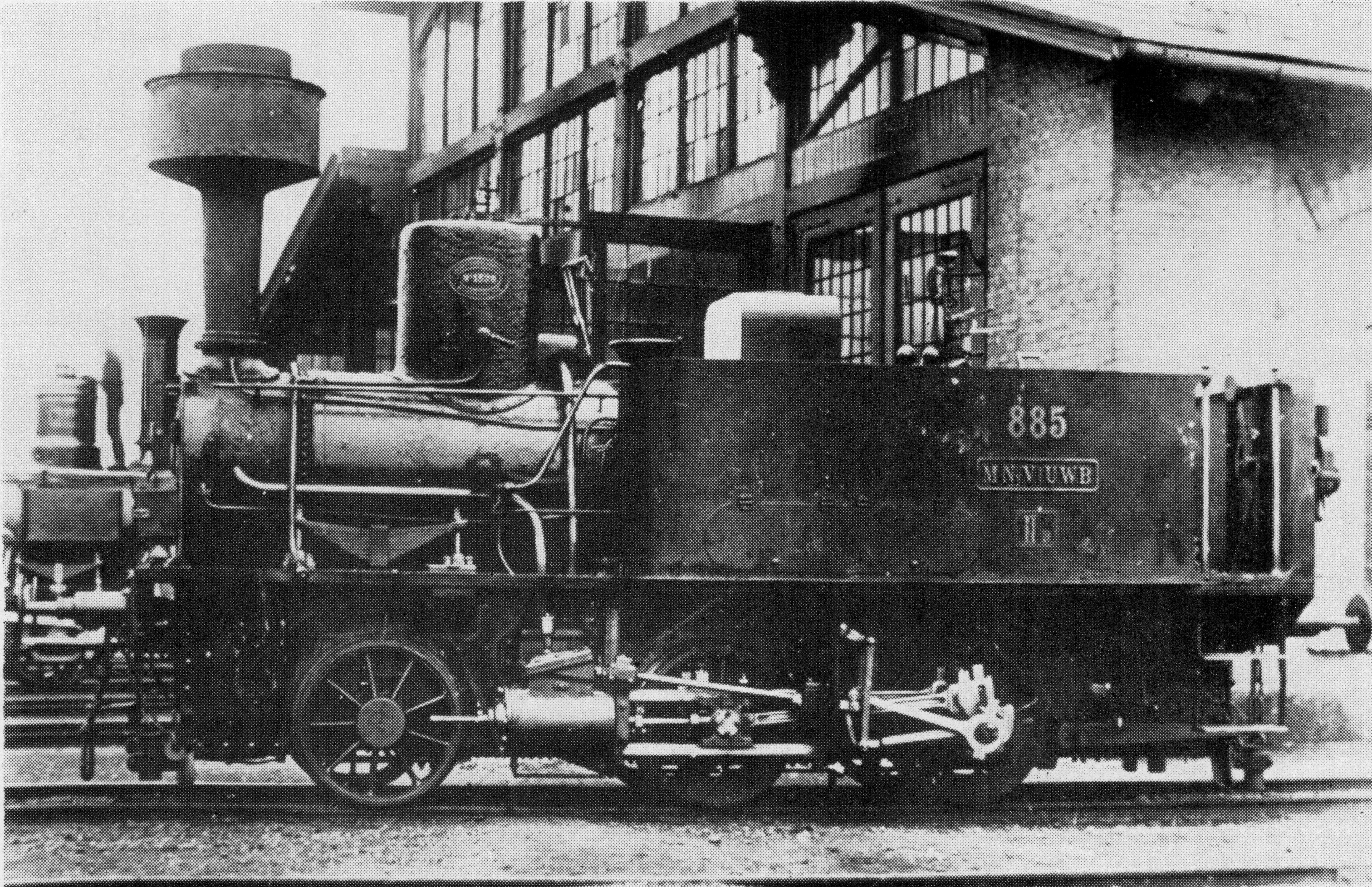 MNyV 31-72 MÁV 885